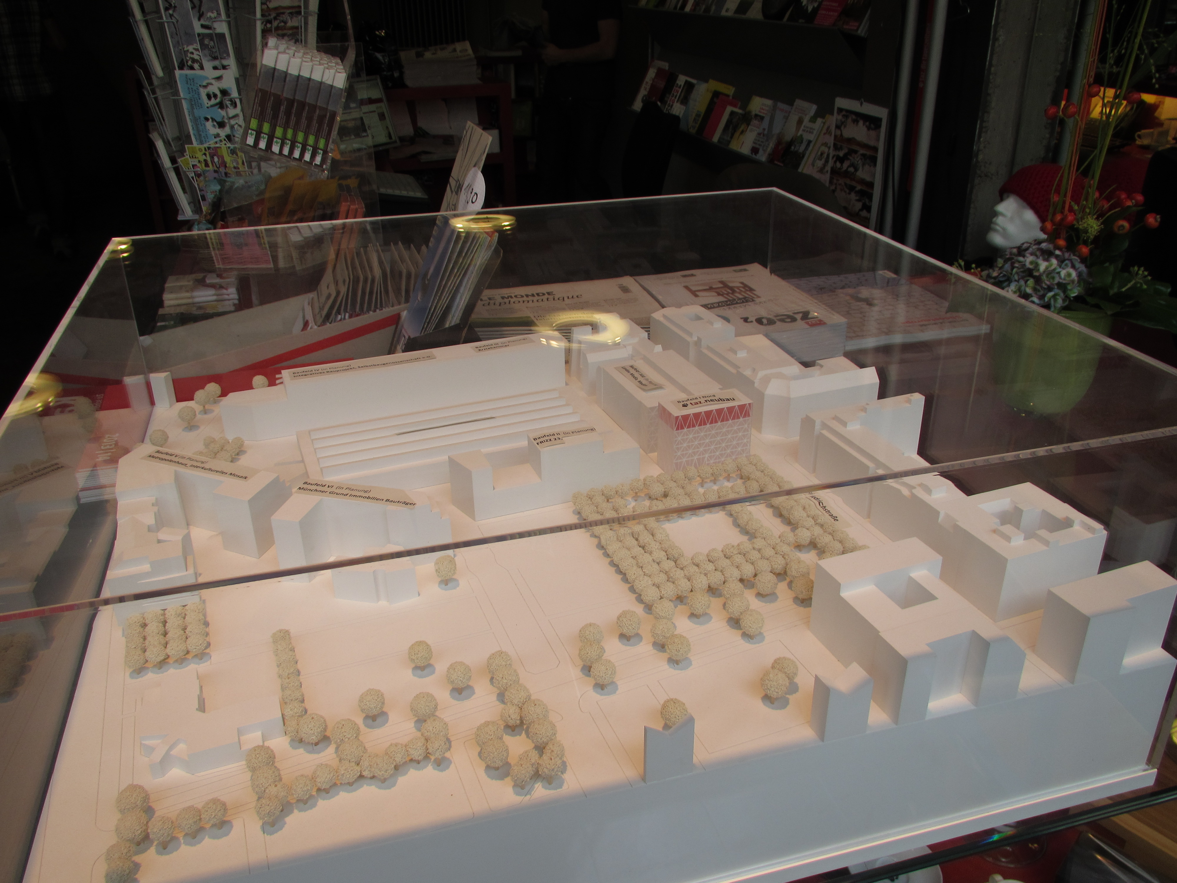 taz--Die-Tageszeitung-Modell-des-Neubau-Projektes